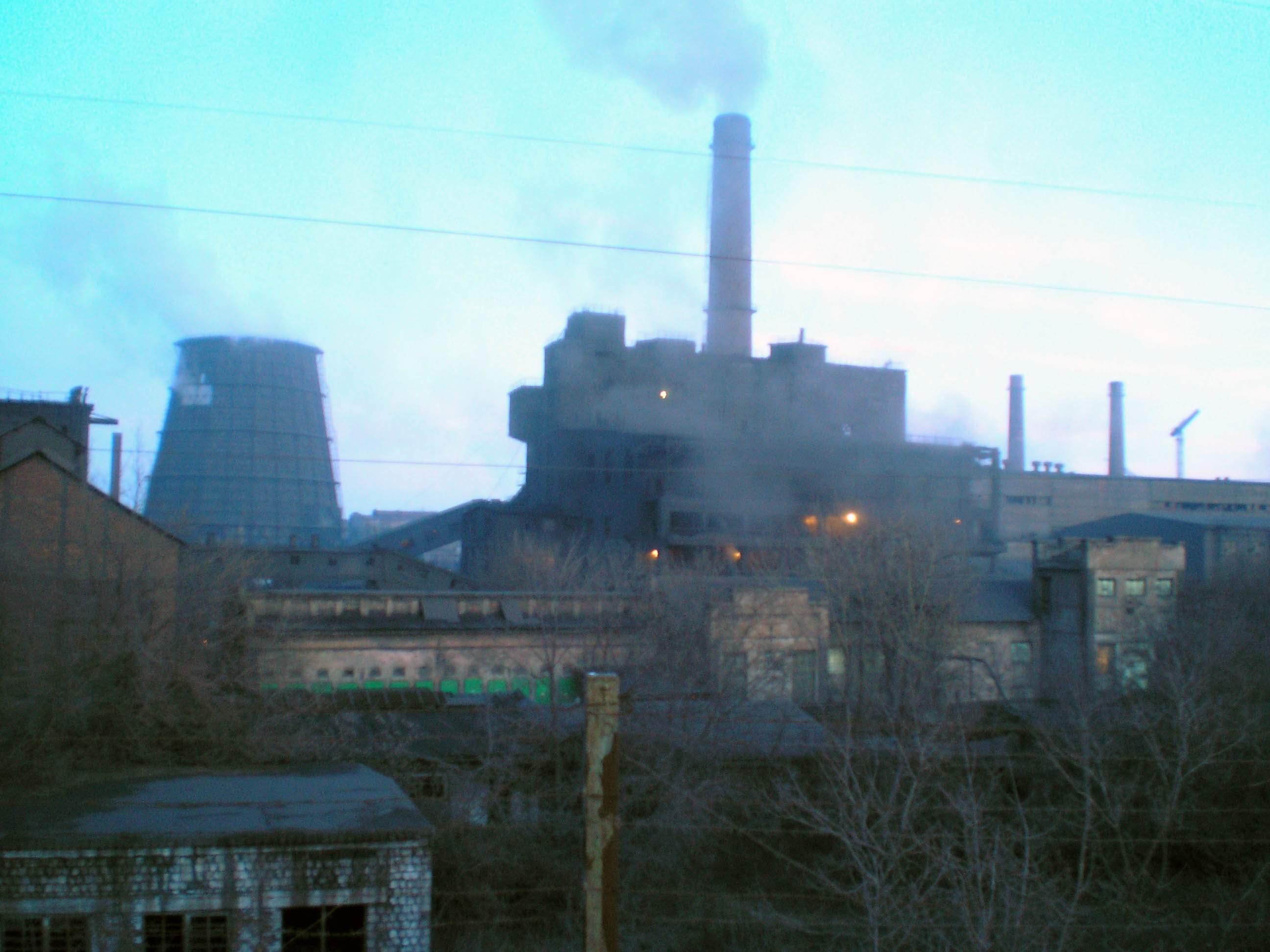 Енакиевский металлургический завод (вид на Аглофабрику)